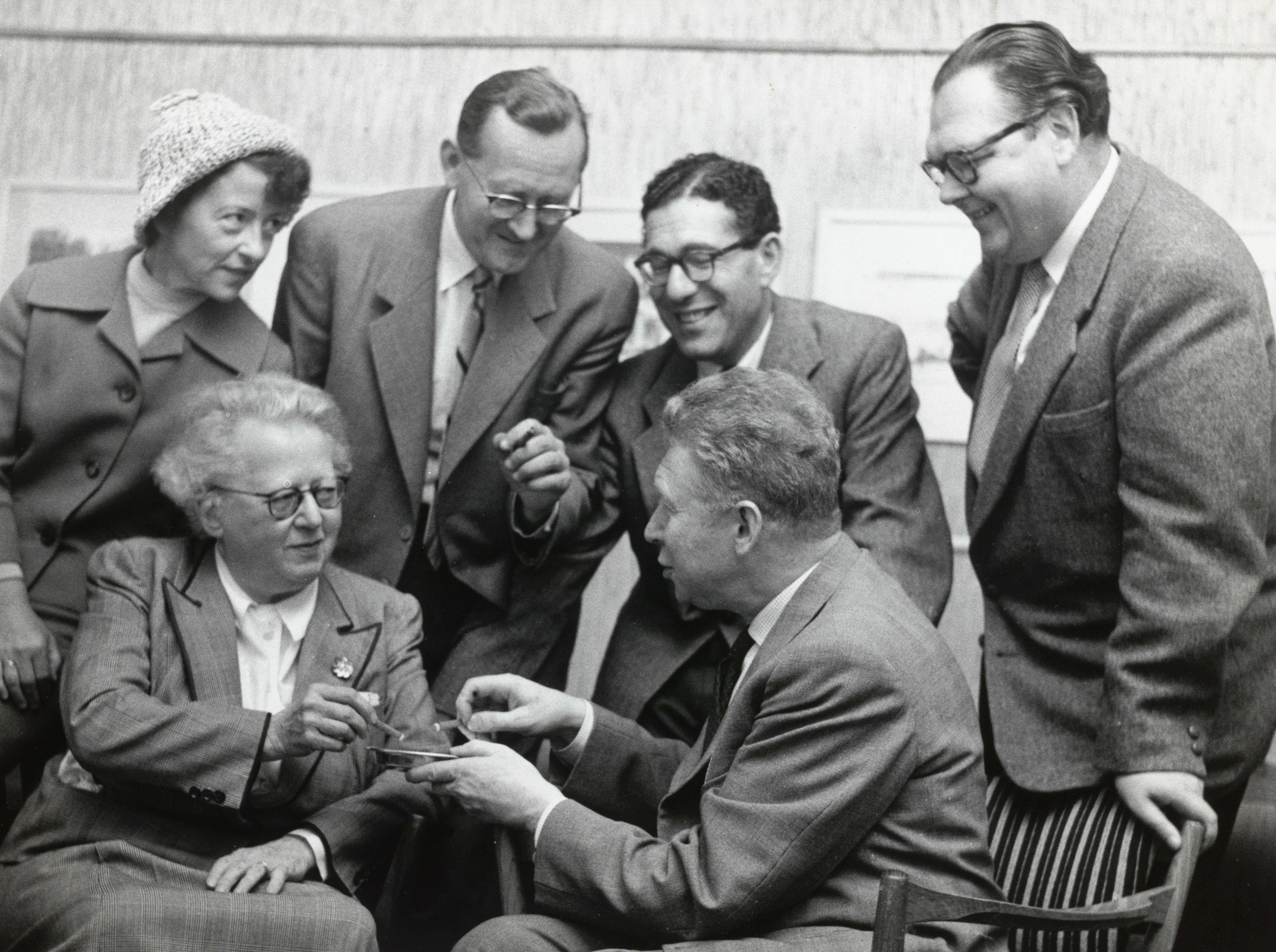 Bildet er hentet fra Nasjonalbibliotekets bildesamling Depicted person: Andersen, Karl Depicted person: Hall, Pauline Margrete Depicted person: Siem, Kåre Depicted person: Glaser, Ernst